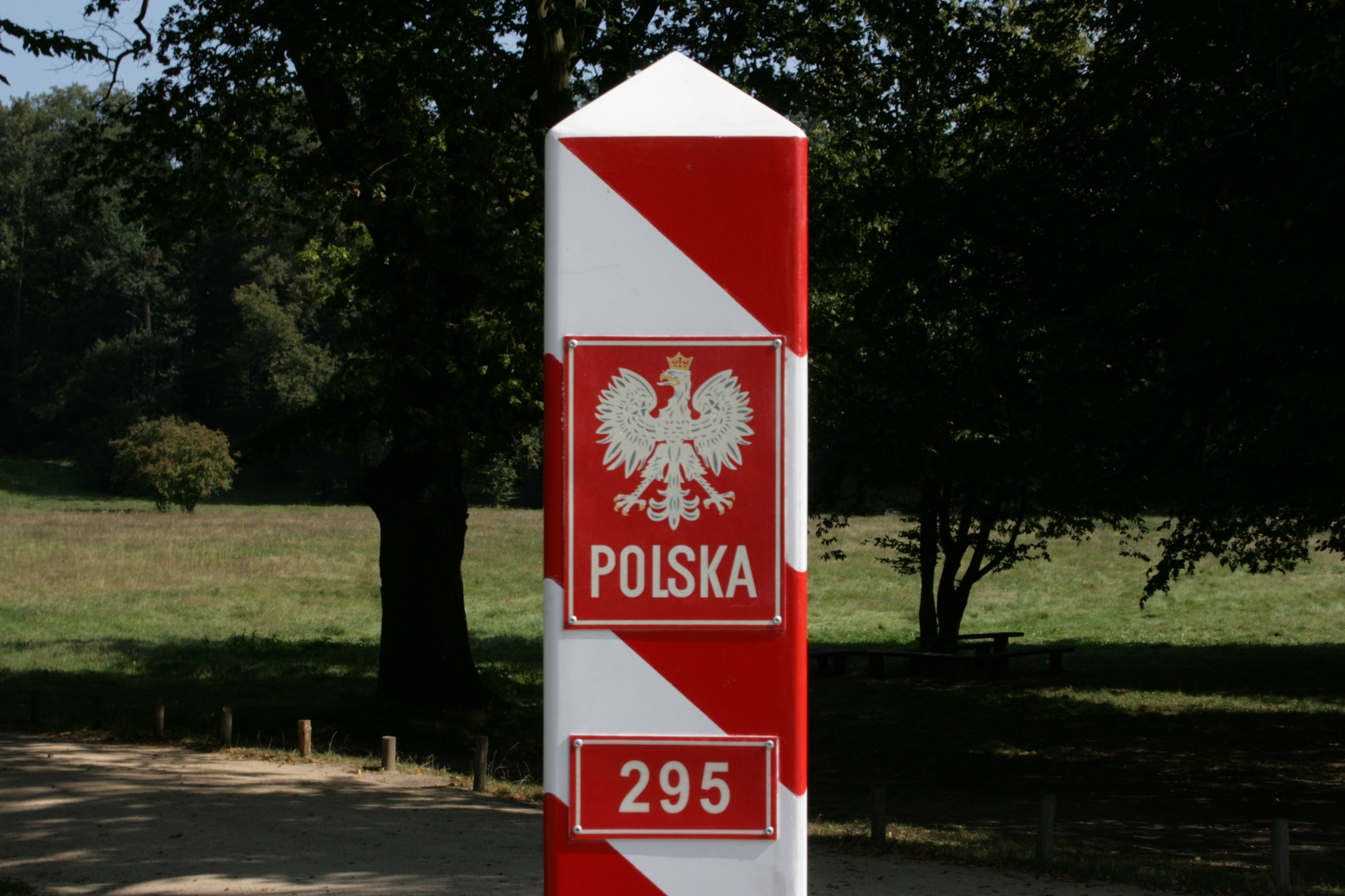 Muskauer Park in Łęknica